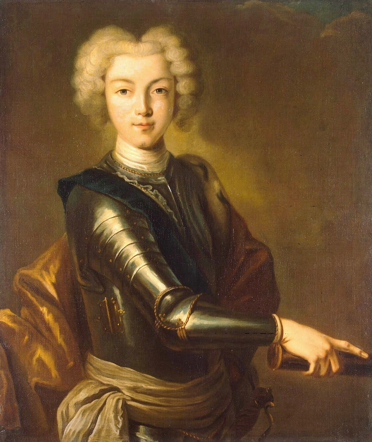 Portrait of Peter II of Russia (1715-1730)label QS:Lru,"Россия. 18 в. - начало 19 в. Гос."